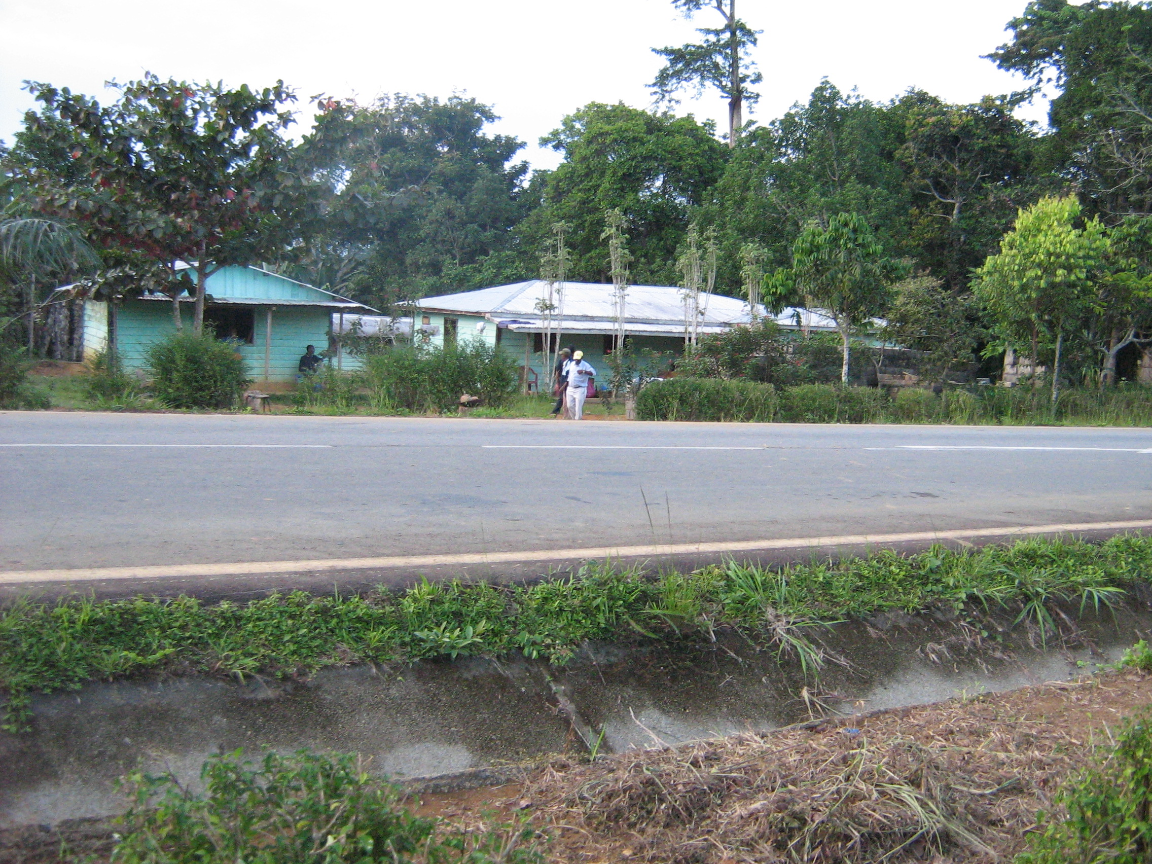 Tchimazok, vue